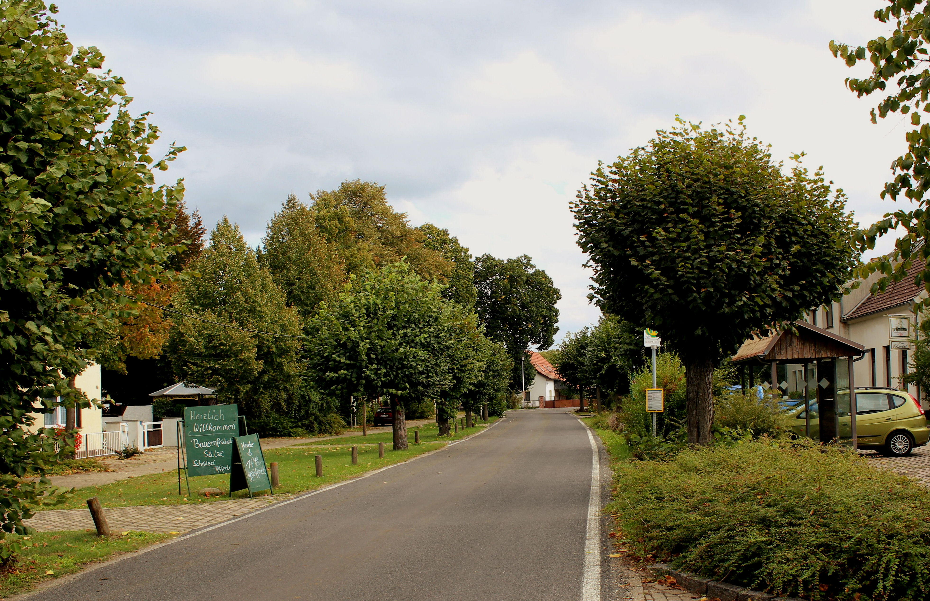 Zeischaer Dorfmitte.